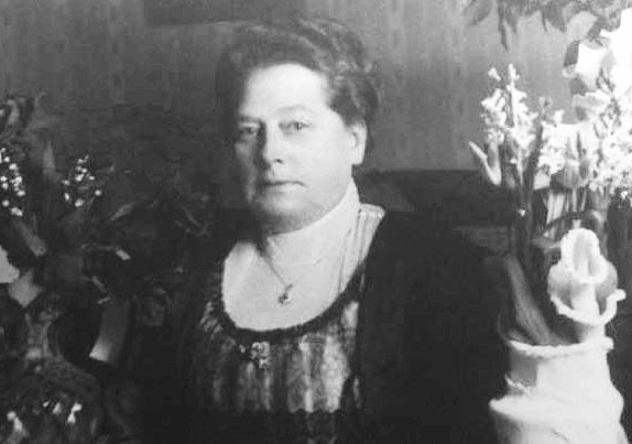 Augusta Andersson 1937 ägare av restaurant 55:an till 1931